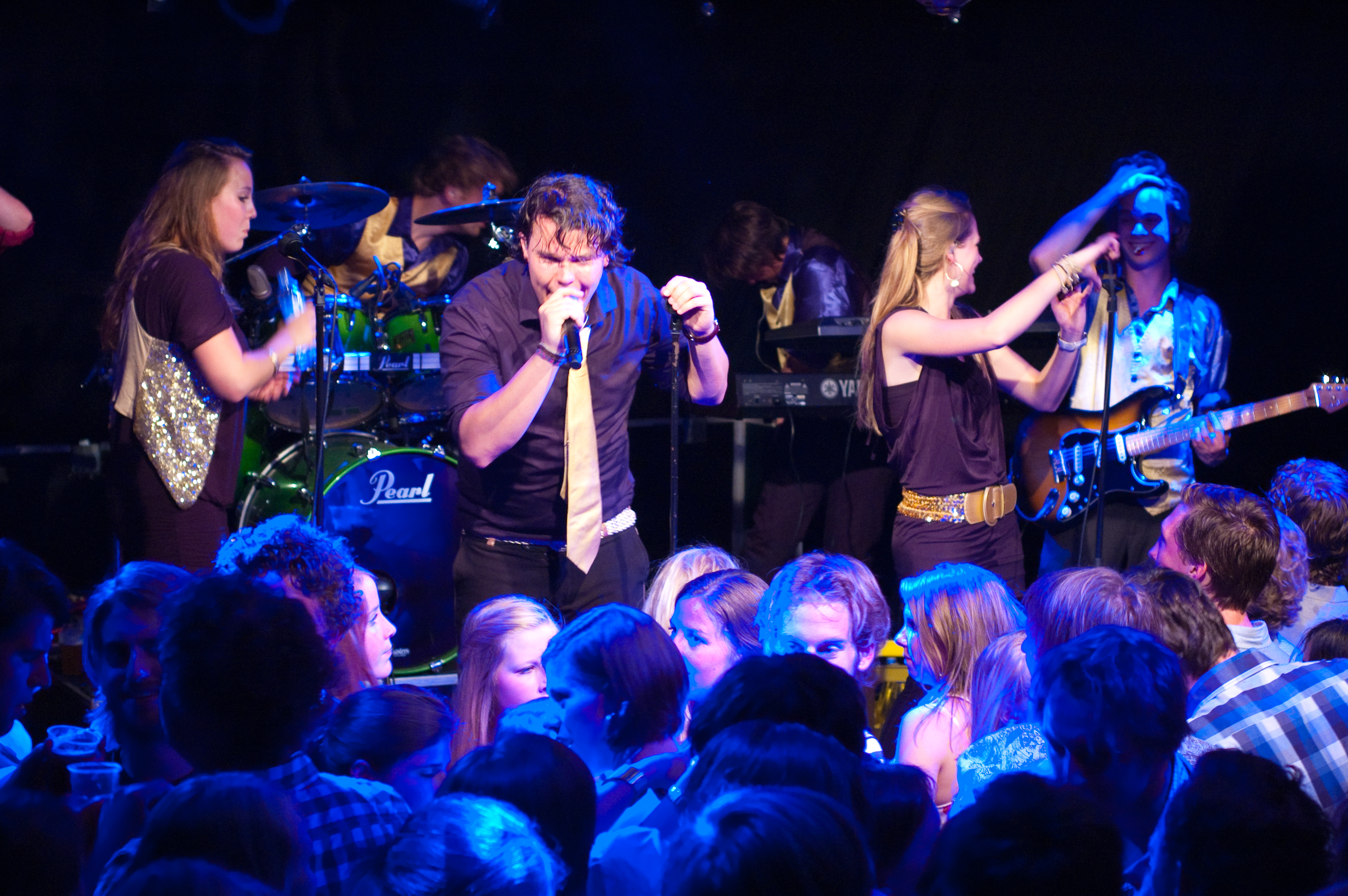 De Hermes Houseband